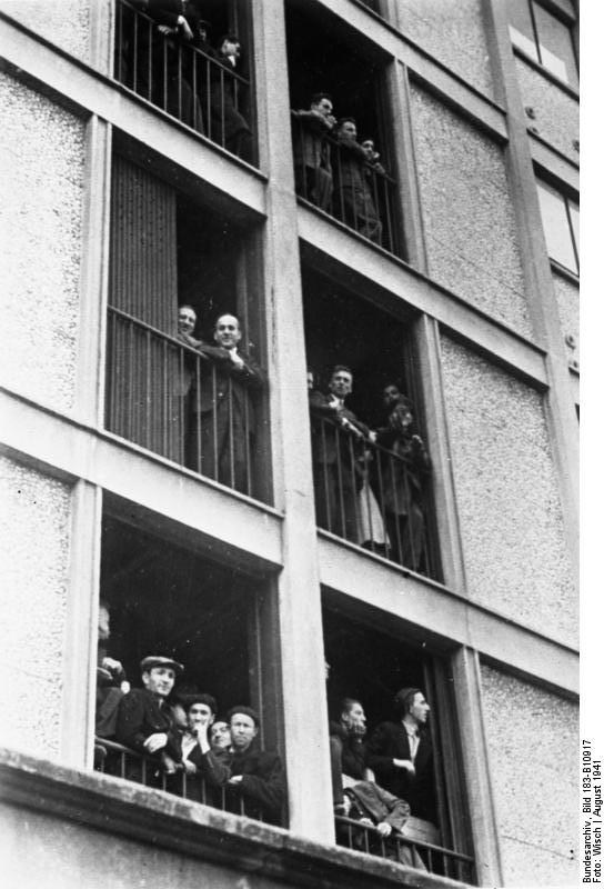 Frankreich, Internierungslager Drancy Scherl: Im besetzten Gebiet. (Frankreich) Festnahme von Juden in Paris. Im Lager von Drancy. PK-Aufnahme: Kriegsberichter: Wisch 8281-41 "Fr." "Fr.OKW" Aug.41. ADN-ZB: Frankreich in der Periode der deutschen Okkupation und des Vichy-Regimes 1940/44 In Paris festgenommene ausländische Juden im Internierungslager Drancy. (Aufn.: August 1941/Wisch)